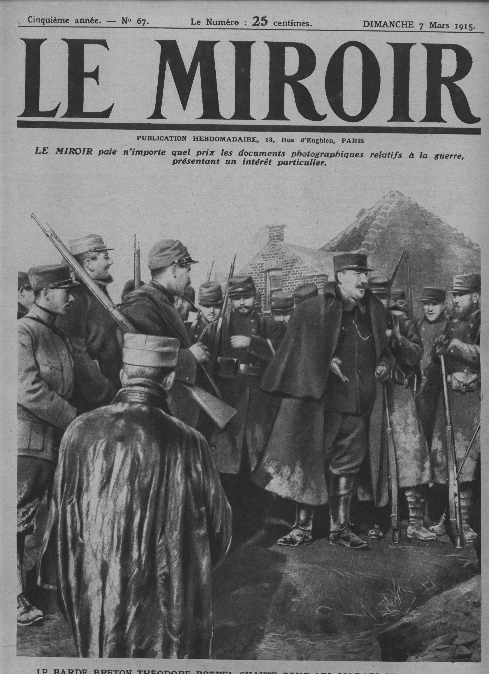 Théodore Botrel, barde breton chantant pour la troupe, publication du journal Le Miroir.